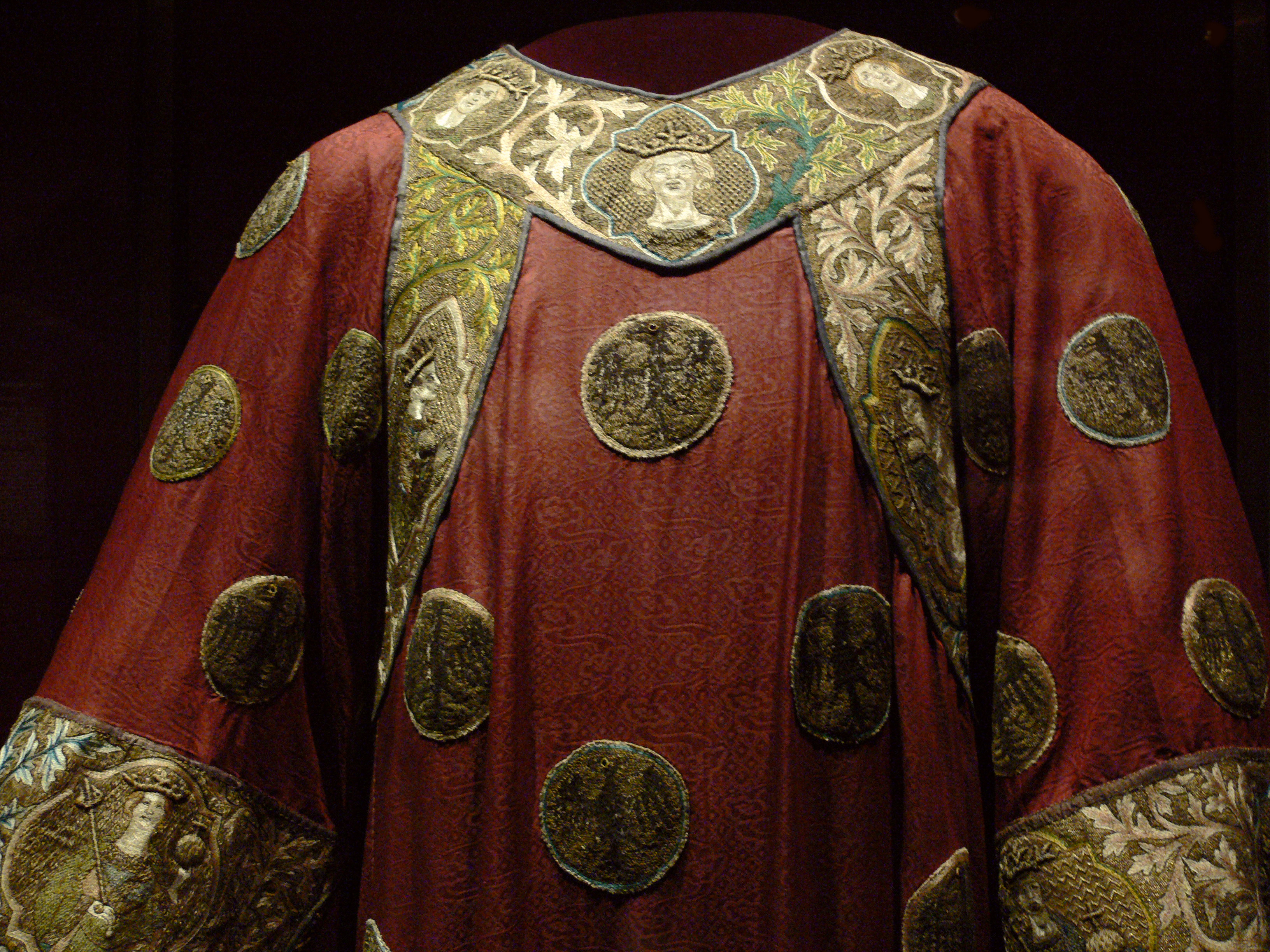 Adlerdalmatika. Süddeutsch, 1330-1340. Stoff: chinesisch, um 1300. Seidenkörperdamast, Gold- und Seidenstickerei, Glassteinchen. Wien, Weltliche Schatzkammer, Inv. Nr. XIII 15; Detail